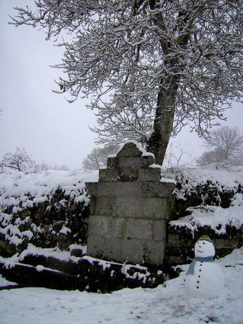 A fonte do barrio durante a nevada de 2008-2009